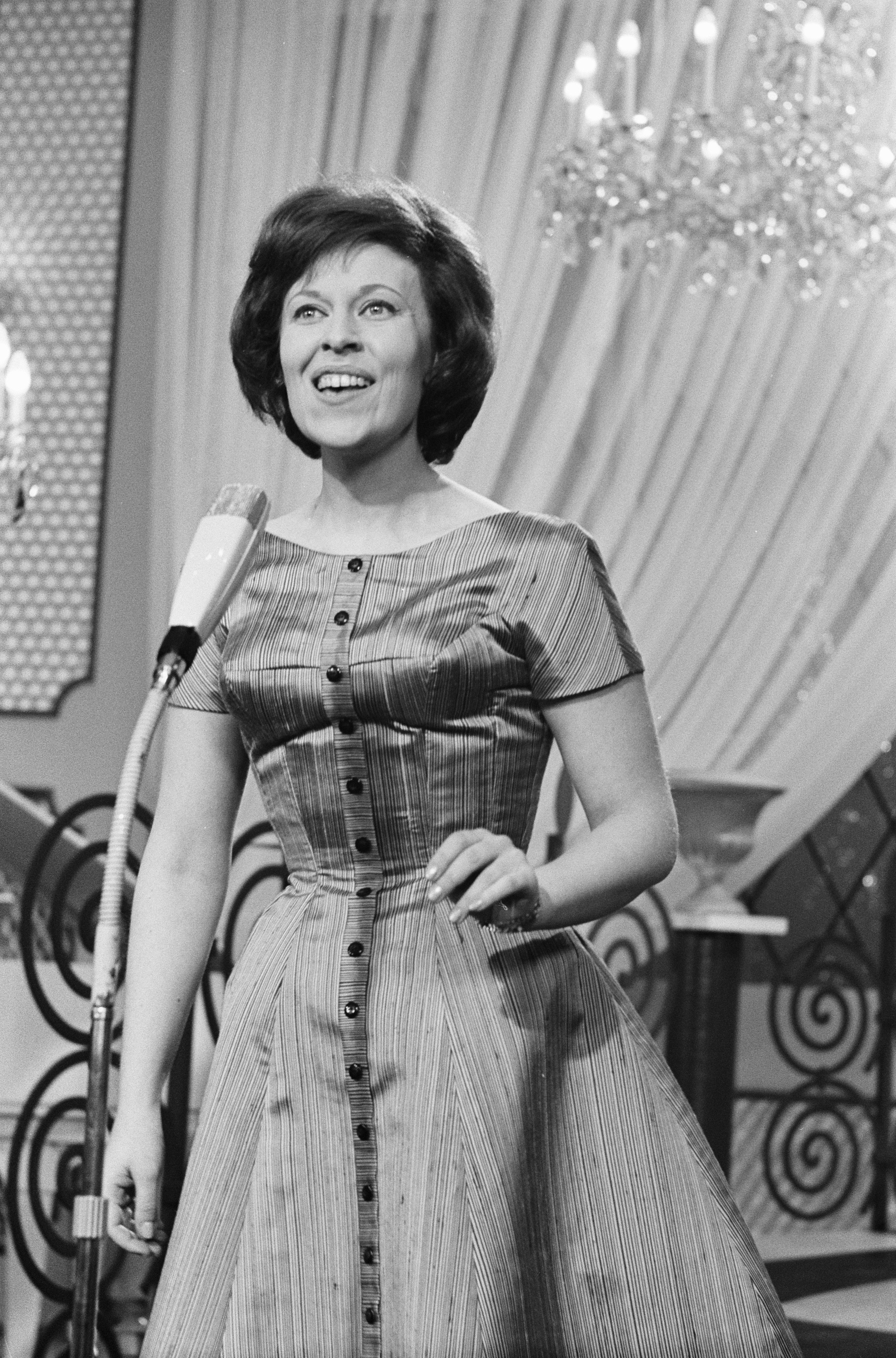 Collectie / Archief : Fotocollectie Anefo Reportage / Serie : [ onbekend ] Beschrijving : Eurovisie Songfestival 1962 te Luxemburg, voor Zweden Inger Berggren Datum : 18 maart 1962 Locatie : Luxemburg, Zweden Trefwoorden : artiesten, songfestivals Persoonsnaam : Berggren Inger Fotograaf : Pot, Harry / Anefo Auteursrechthebbende : Nationaal Archief Materiaalsoort : Negatief (zwart/wit) Nummer archiefinventaris : bekijk toegang 2.24.01.05 Bestanddeelnummer : 913-6603